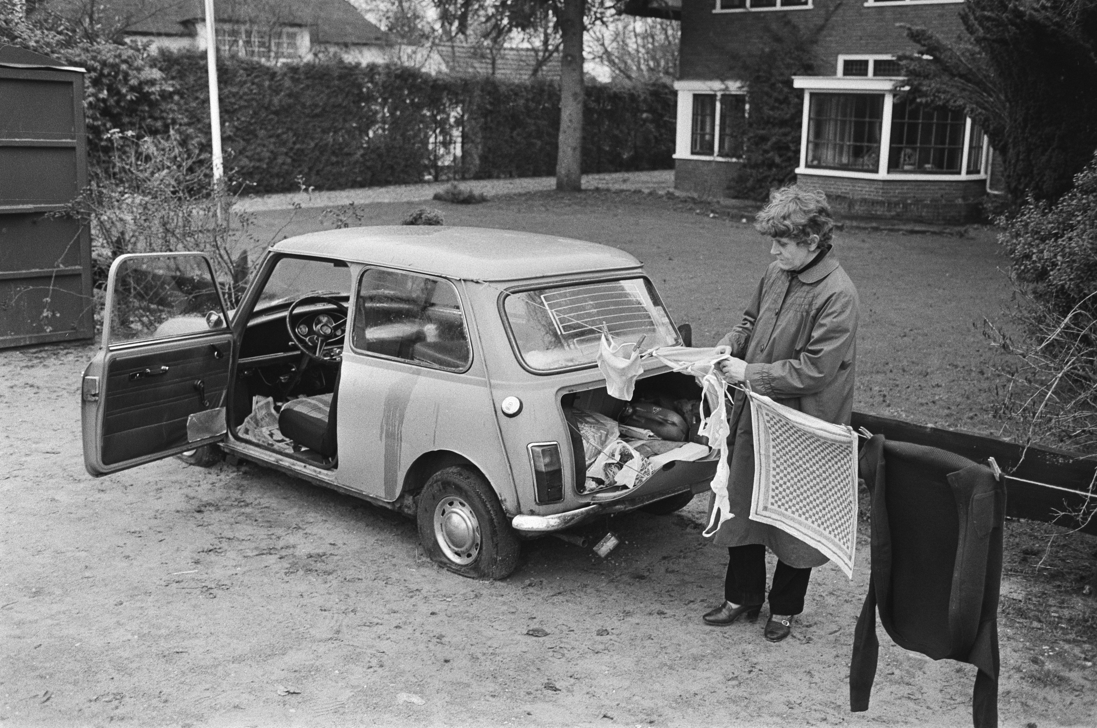 Collectie / Archief : Fotocollectie Anefo Reportage / Serie : [ onbekend ] Beschrijving : 38-Jarige Willy van den Heuvel woont al 3 jaar in Mini Ede, uit protest dat zij niet de woning kreeg die zij wil Datum : 5 januari 1982 Locatie : Ede Trefwoorden : auto's Persoonsnaam : Heuvel, Willy van den Fotograaf : Antonisse, Marcel / Anefo Auteursrechthebbende : Nationaal Archief Materiaalsoort : Negatief (zwart/wit) Nummer archiefinventaris : bekijk toegang 2.24.01.05 Bestanddeelnummer : 931-8942